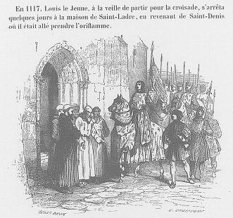 le roi Louis le Jeune fait une halte à la maison de Saint-Ladre, en 1117, alors qu'il part pour la croisade (Illustrations de Les rues de Paris ancien et moderne. 358-1848, origine et histoire. Monuments, costumes, moeurs, chroniques et traditions)